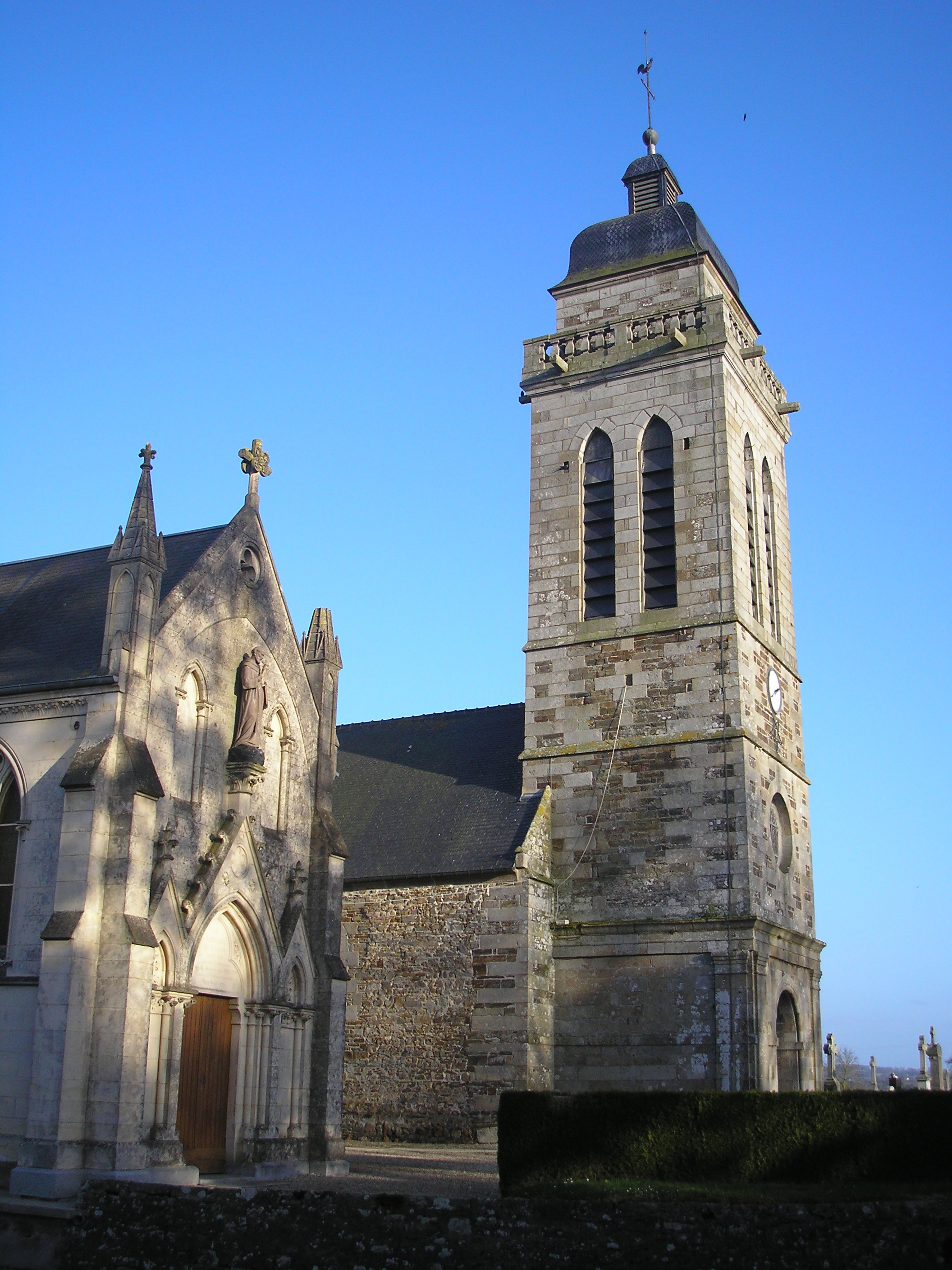 Landelles-et-Coupigny (Normandie, France). L'église Saint-Pierre (à droite) et la chapelle Saint-Ortaire (à gauche).